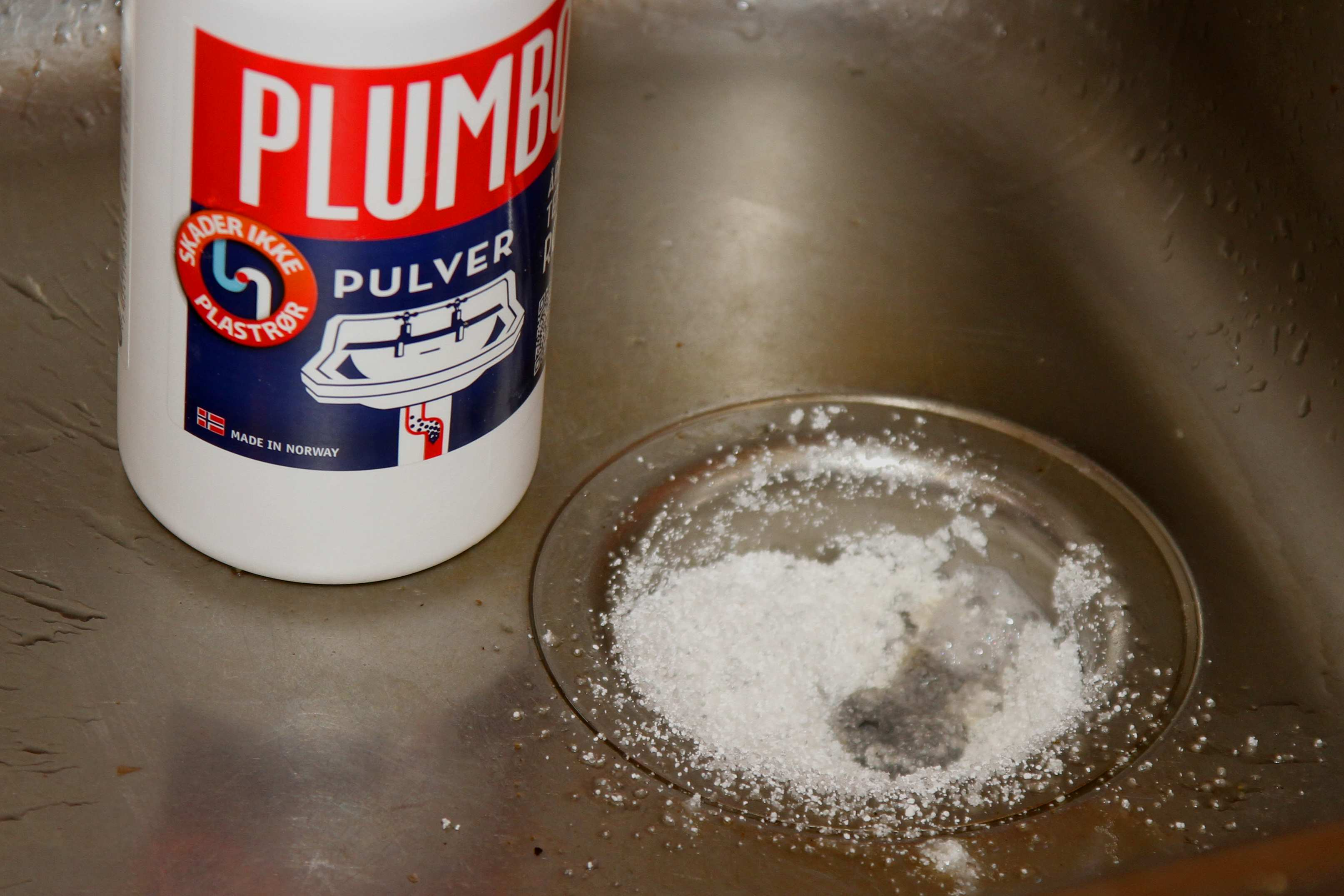 Plumbo, et pulver som brukes til å åpne tette avløp.